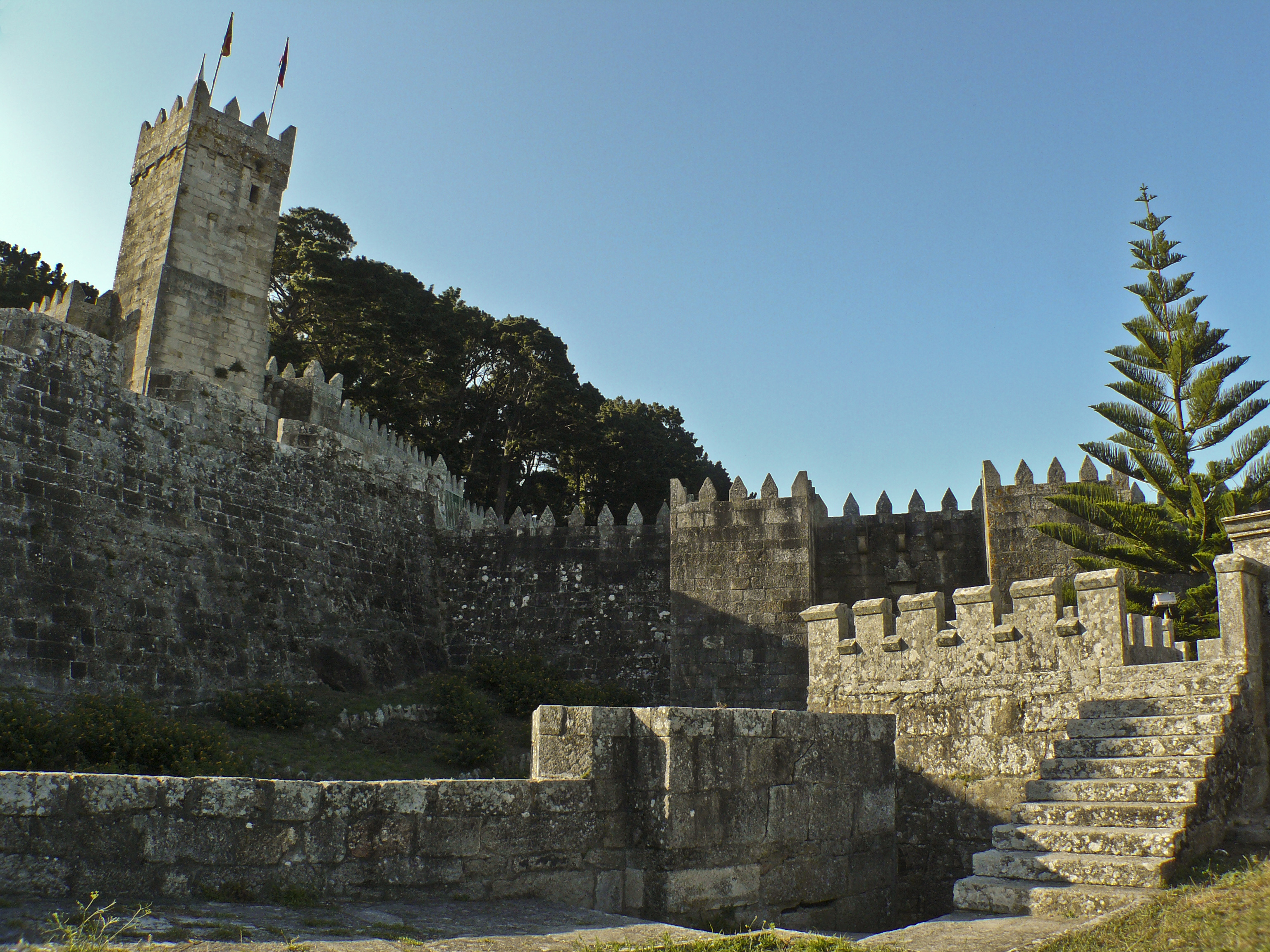 Torre e fortificacións do Castelo de Monterreal - Baiona - Pontevedra